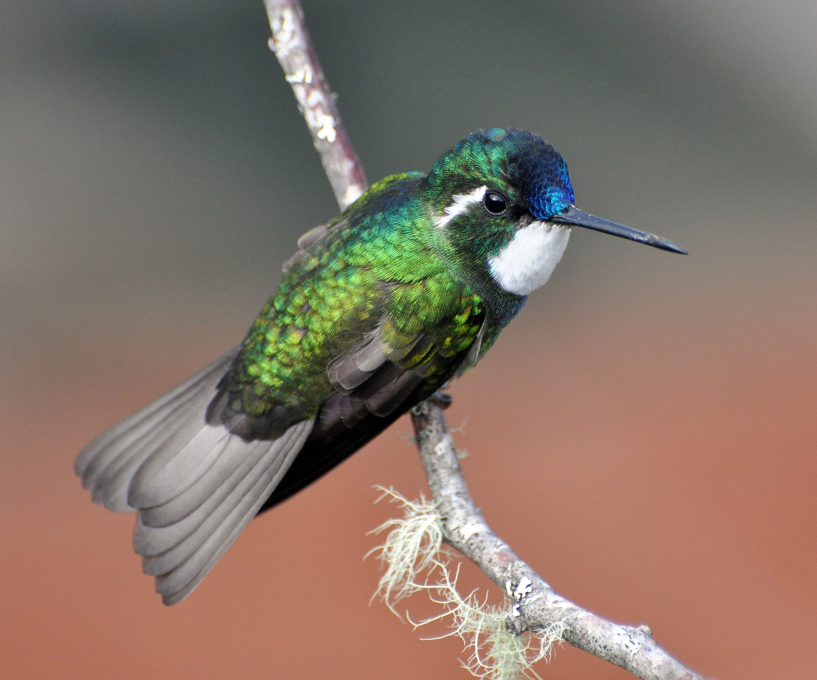 Lampornis castaneoventris cinereicauda 26-Mar-12 Savegre Valley, Costa Rica